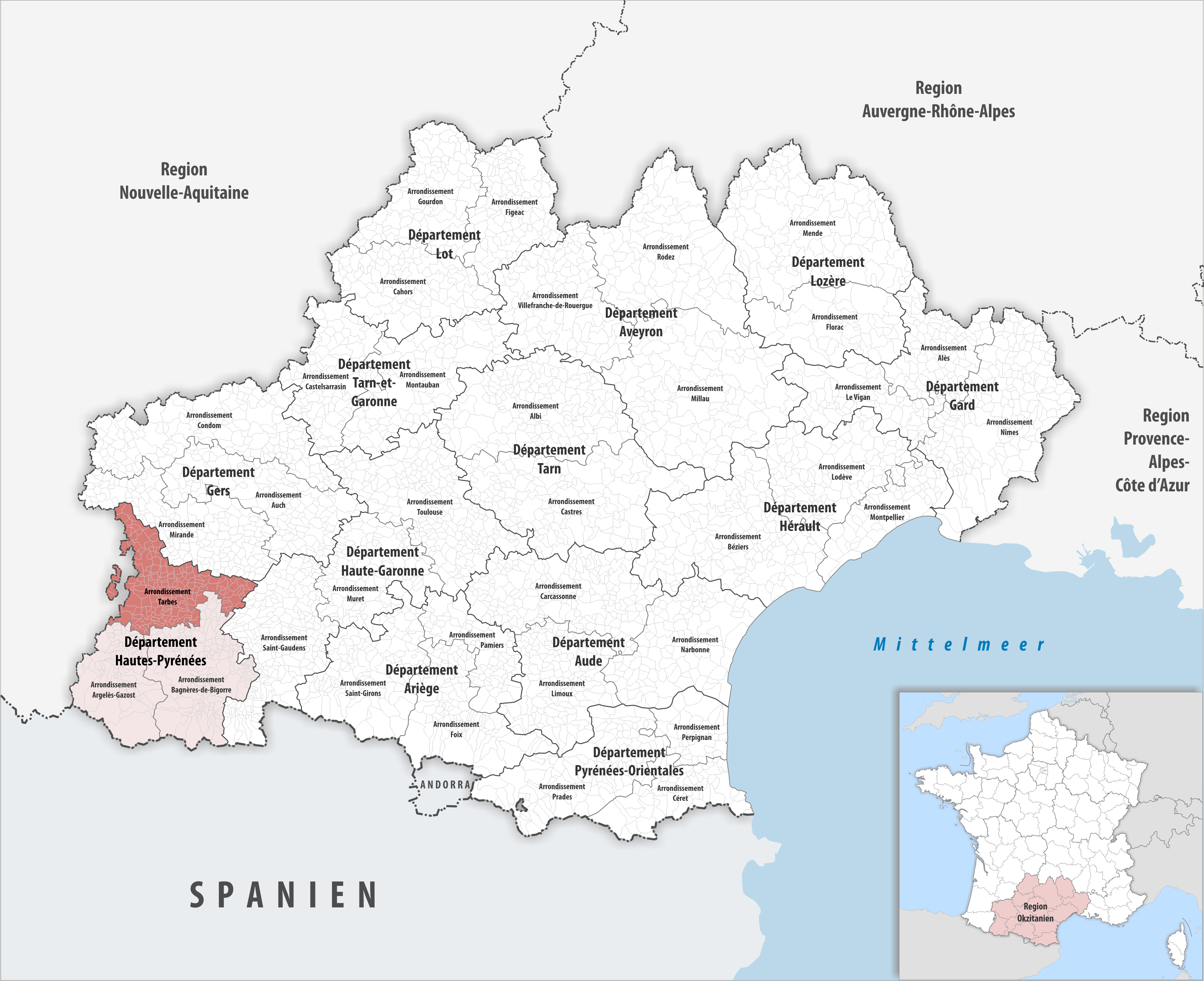 Lage des Arrondissements Tarbes